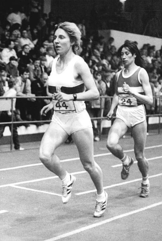 Ines Bibernell, Gabriele Veith ADN-ZB Kluge 15.2.86 Bez. Cottbus: DDR-Hallenmeisterschaften in der Leichtathletik- Mit der neuen DDR-Hallenbestzeit von 8:50,19 min gewann die 20jährige Ines Bibernell (SC Chemie Halle - l.) den Titel über 3000 m vor Gabriele Veith (SC Cottbus - r.).